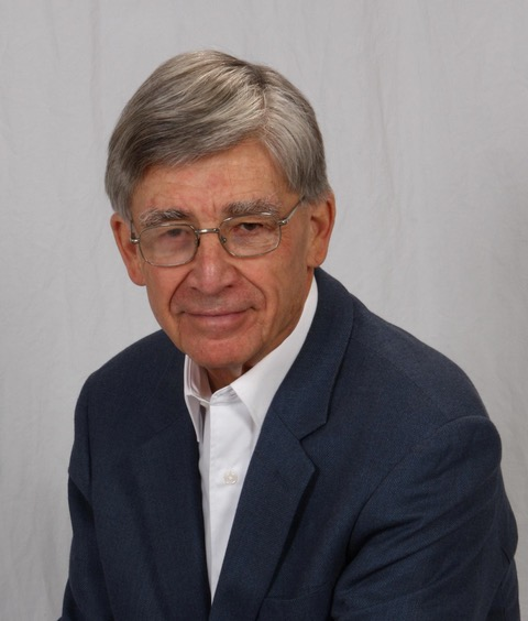 Yves St-Arnaud, 2012 Professeur émérite Université de Sherbrooke